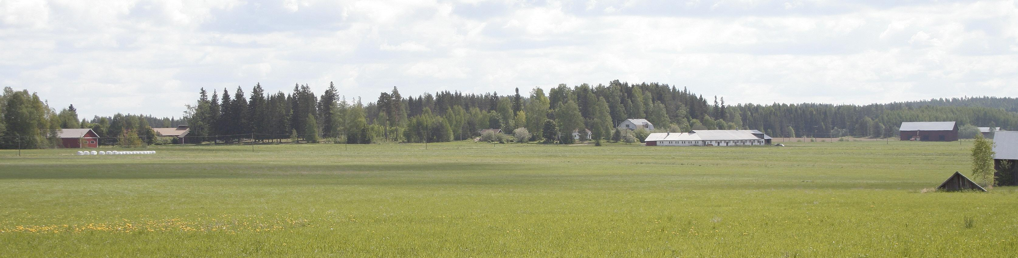 Myrskylän Kylmäsuon pohjoisosa idästä seututie 167:stä Orimattilan ja Myrskylän rajan lähellä erkanevan Niemeläntien kohdalta.